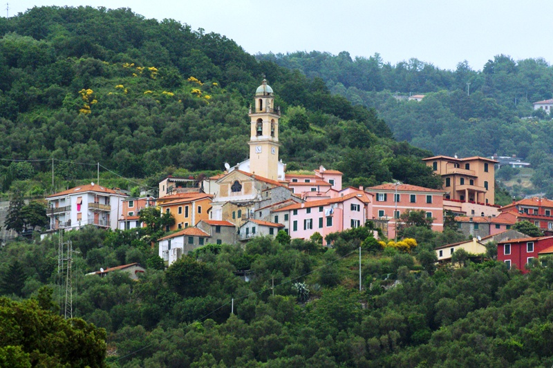 La frazione San Saturnino sulle colline di Moneglia